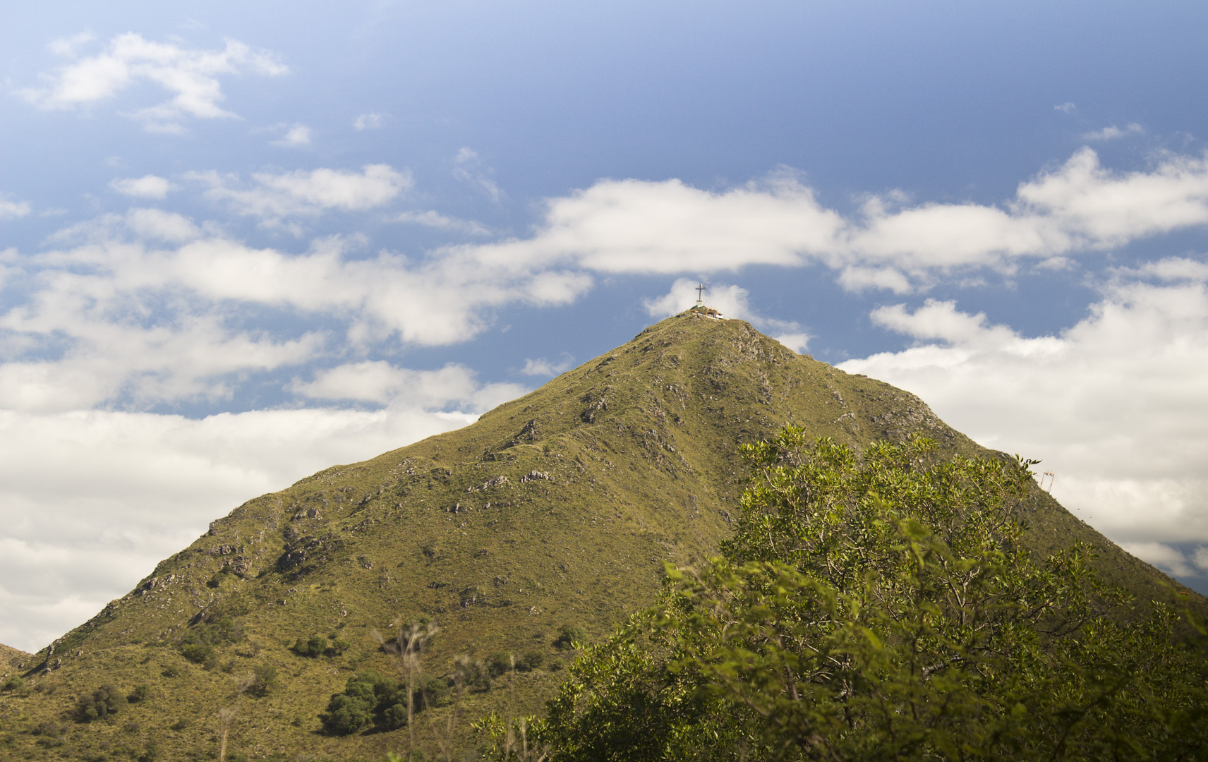 Cara oriental del cerro Pan de Azúcar, visto desde la ruta provincial E54, que une Córdoba y Cosquín.